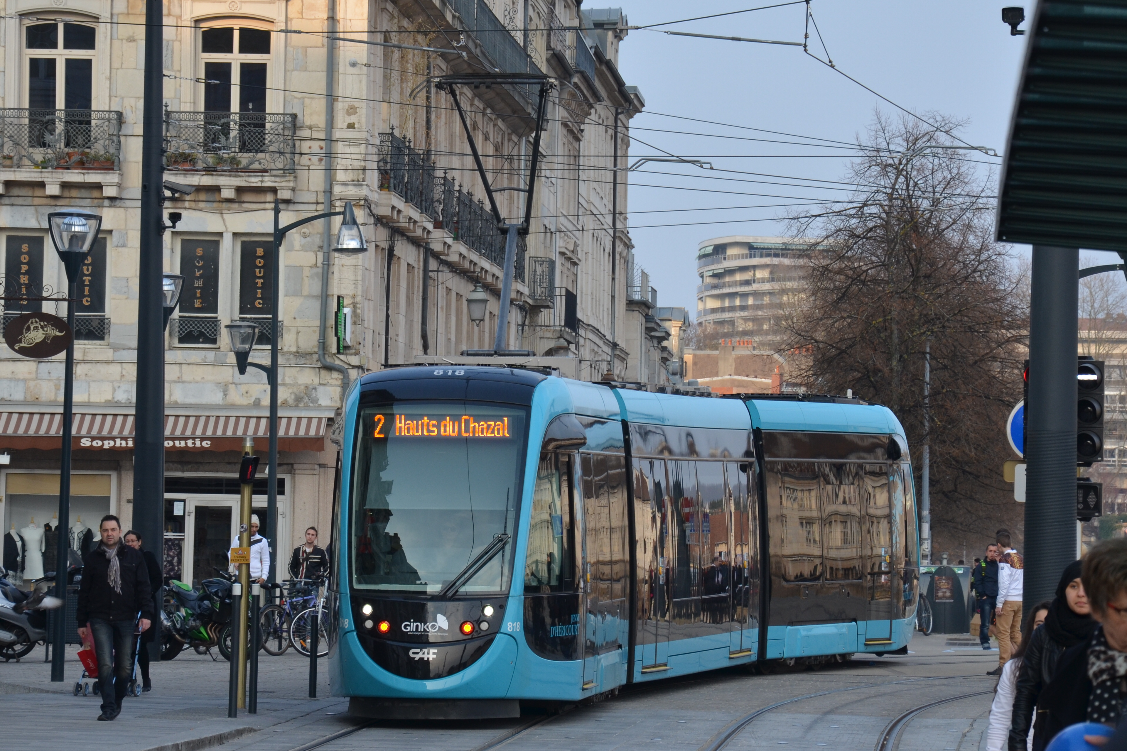 CAF Urbos 3 n°818 sur la ligne 2 du réseau GINKO de Besançon, arrivant à l'arrêt Battant.